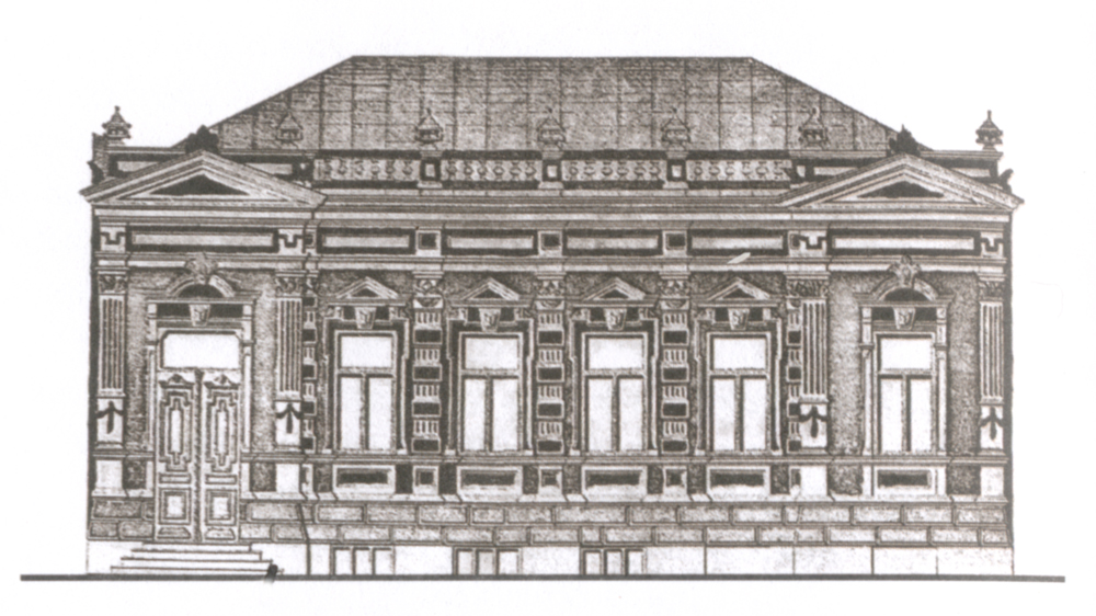 Нахичевань на Дону. Нахичеванского врача Ф. С. Кечекьяна. На месте особняка будет построен городской театр.